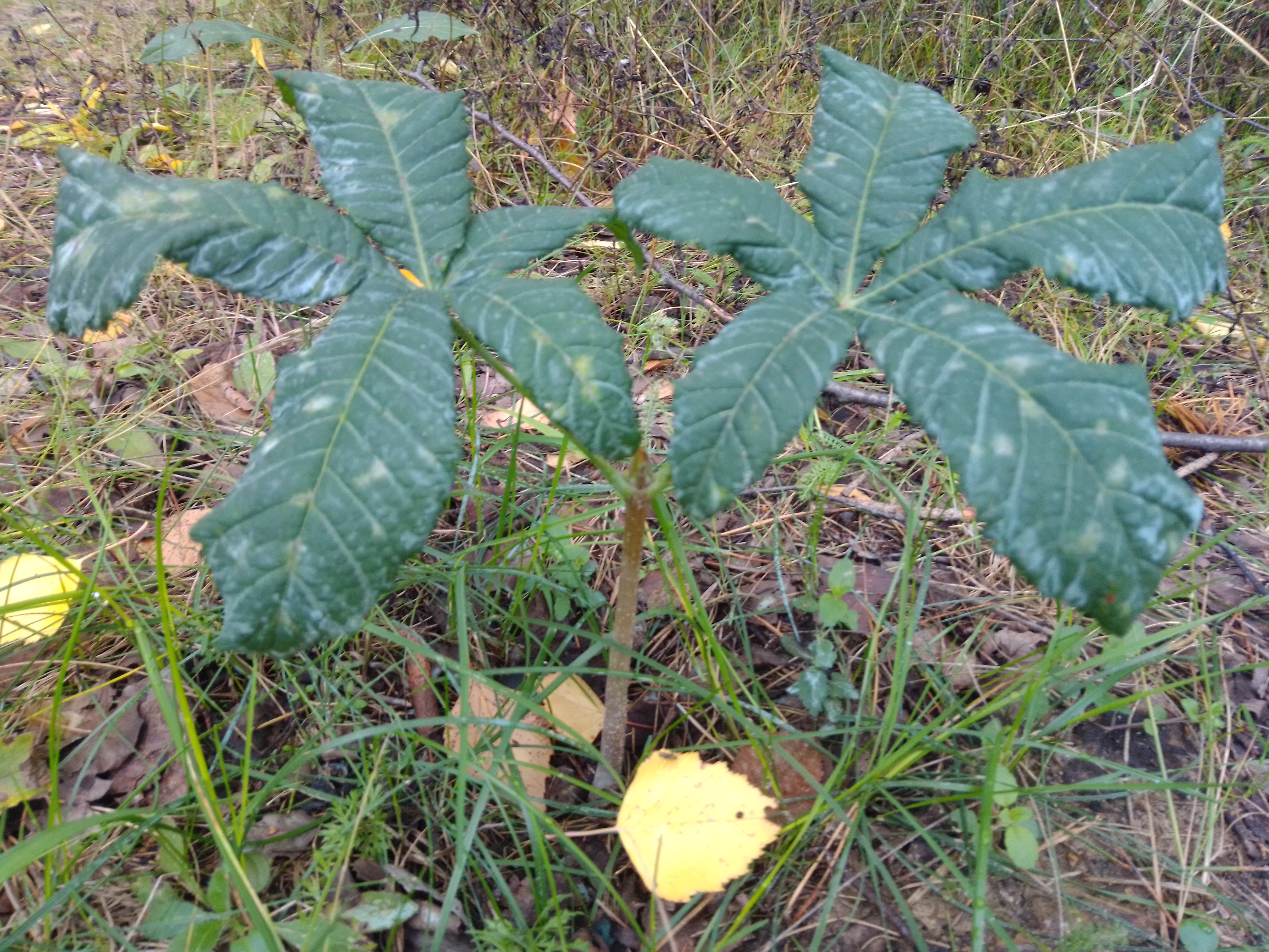 Саженец каштана на 1-м году жизни, поражённый мучнистой росой